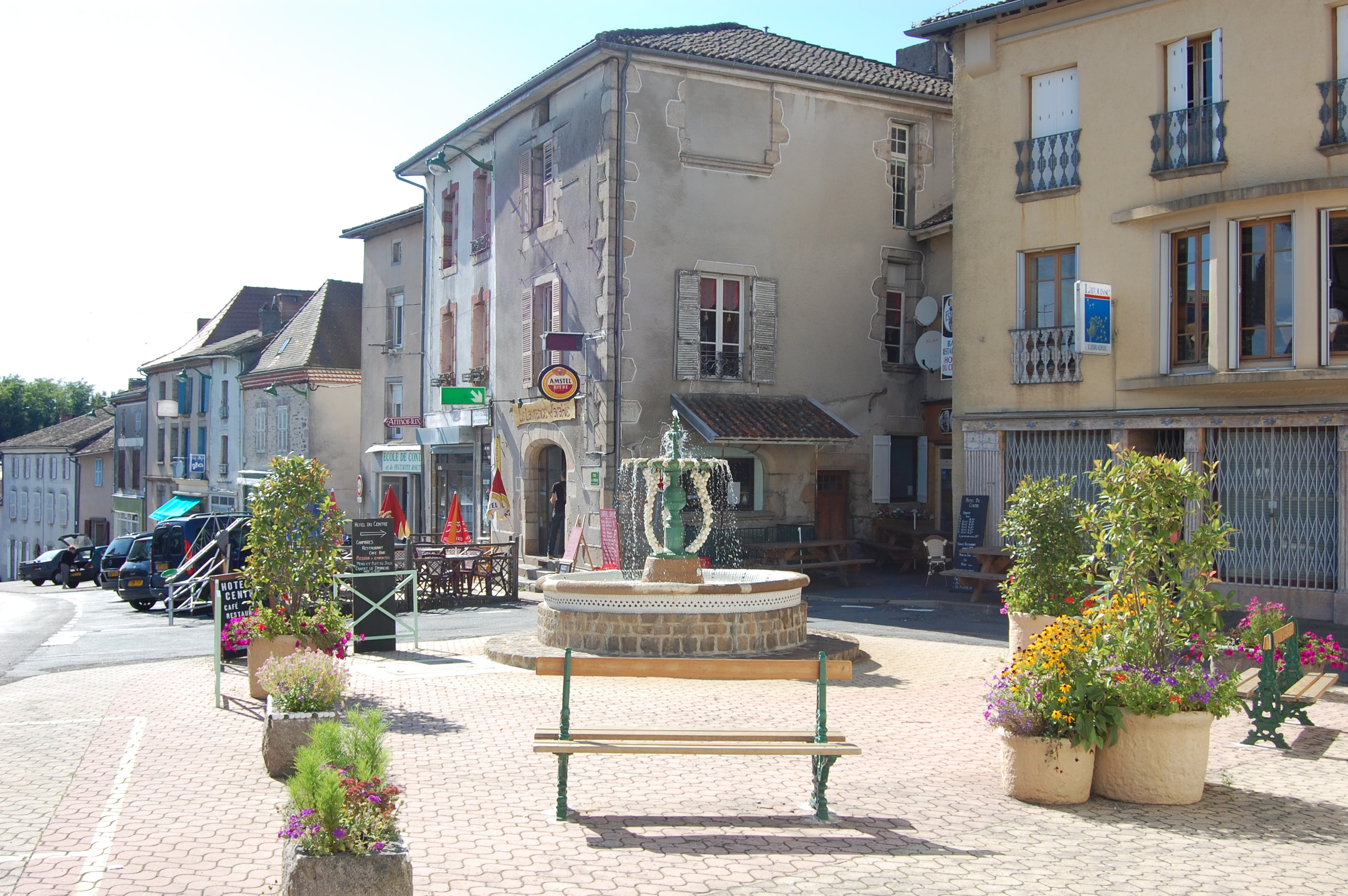 Châlus, haut de la place du marché